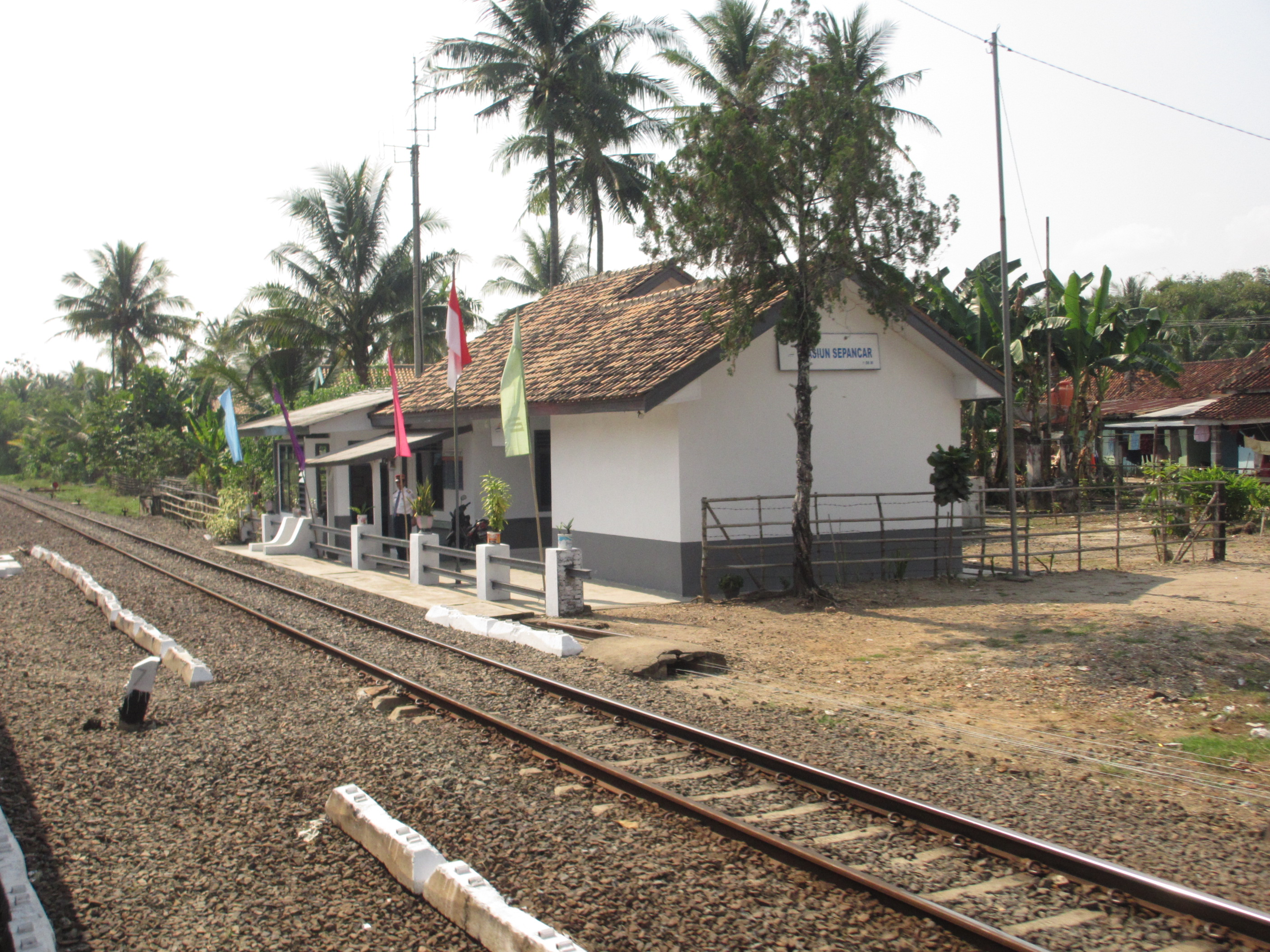 Stasiun kereta api Sepancar.